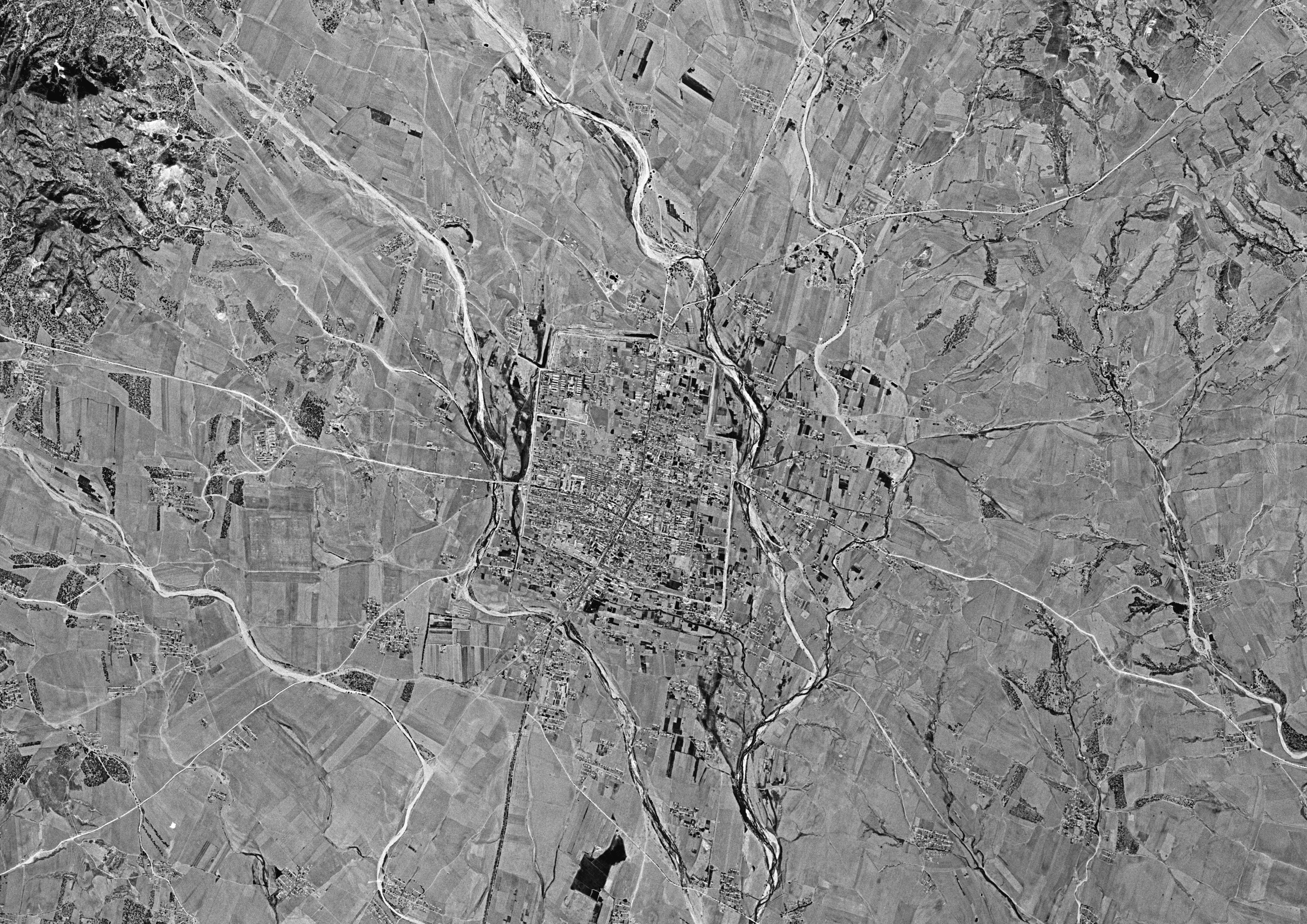 1972年5月原广宁城（时为北镇县城）及周边地区卫星影像。